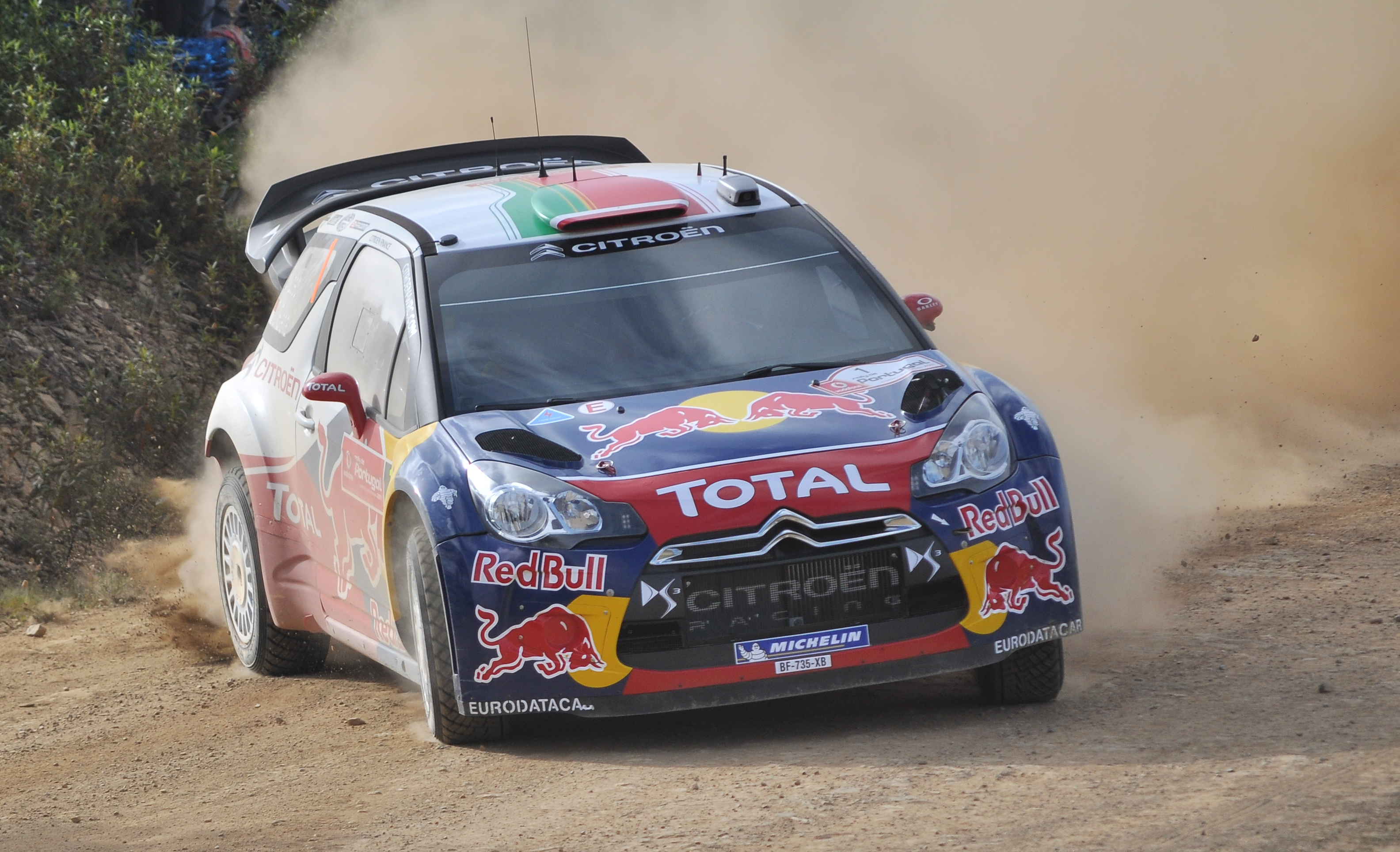 Vodafone Rally de Portugal 2011 - (Santa Clara) - Sébastien Loeb